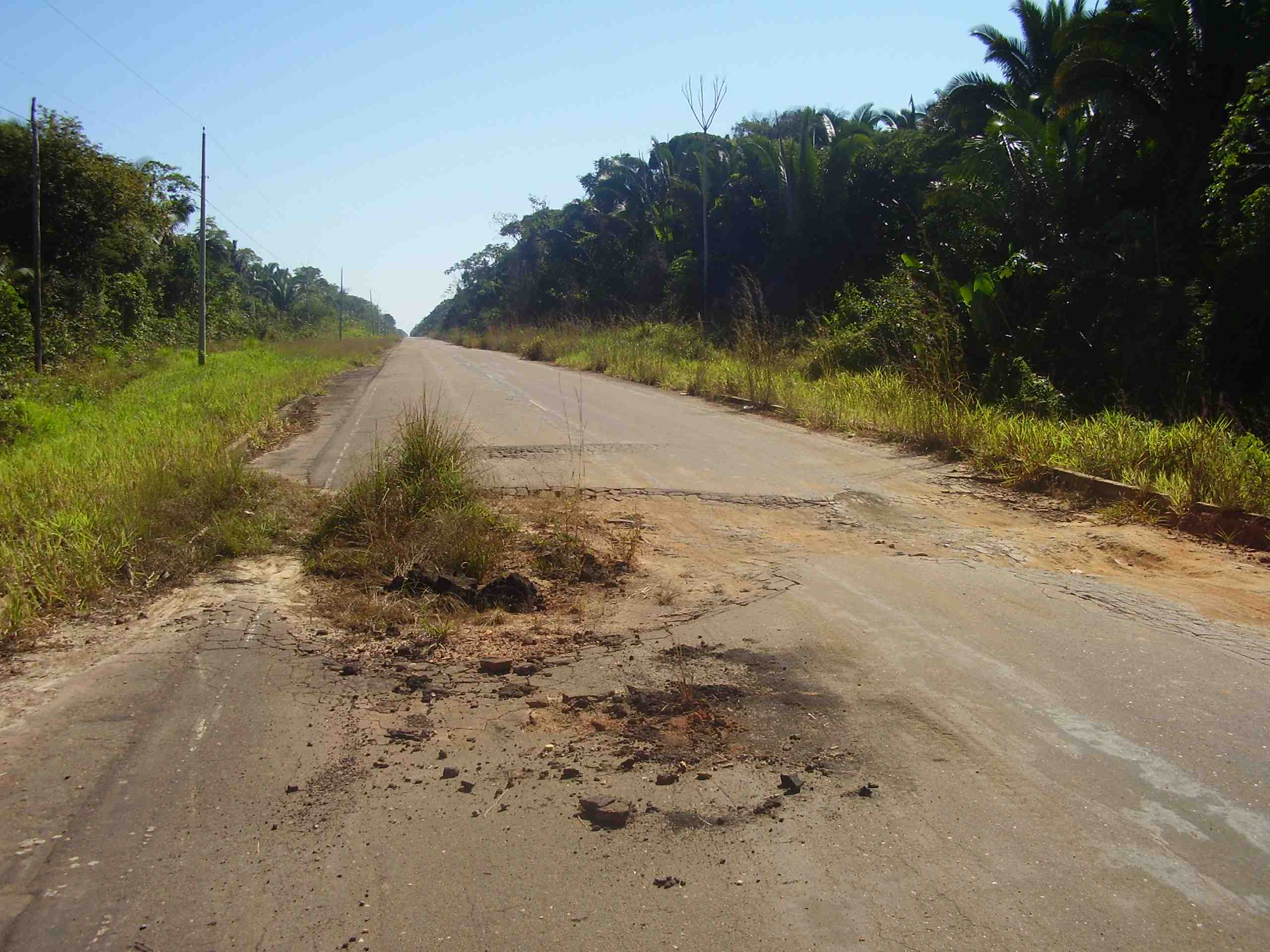 BR-319